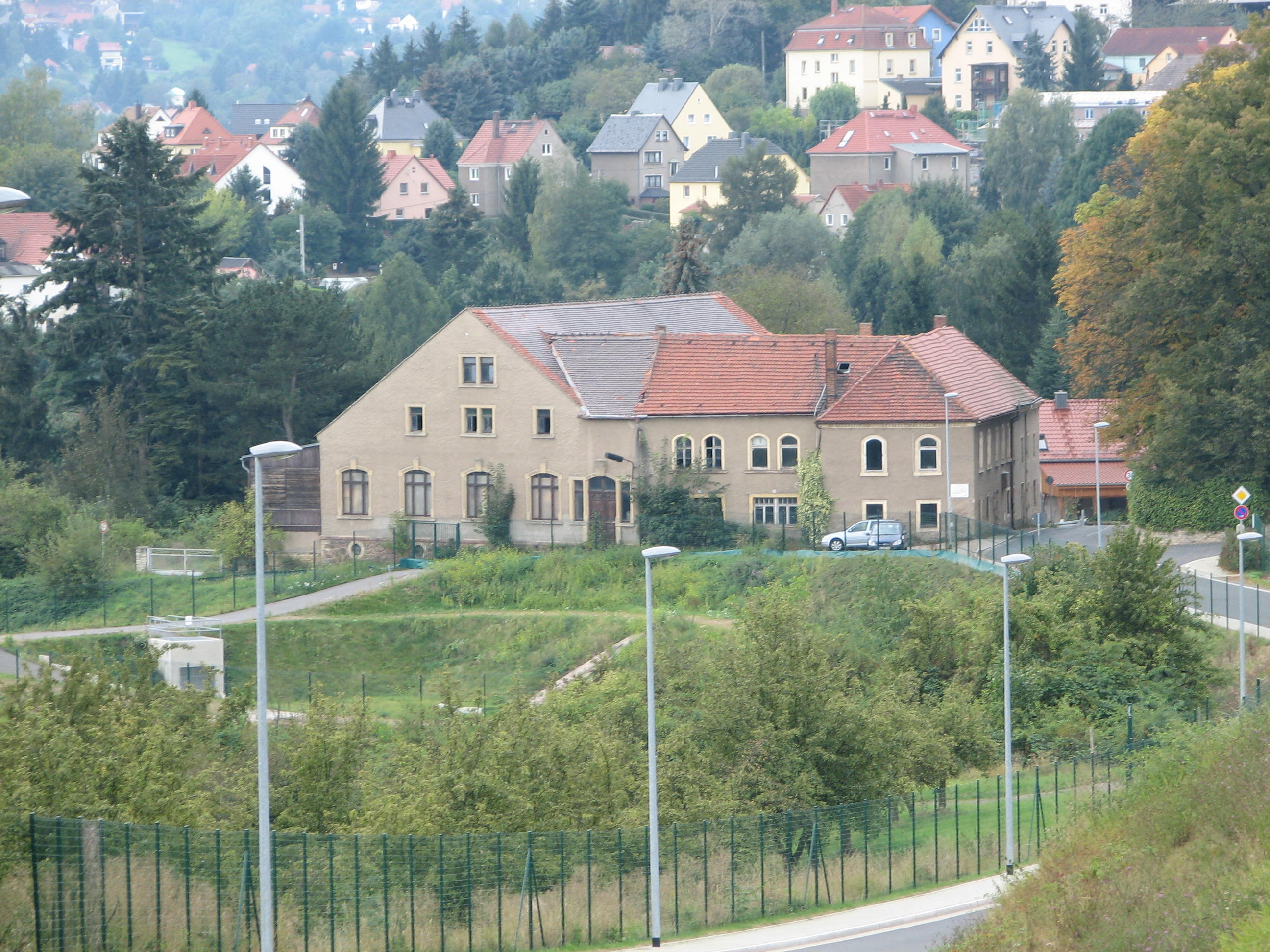 denkmalgeschützter ehemaliger Gasthof, Ansicht von Osten